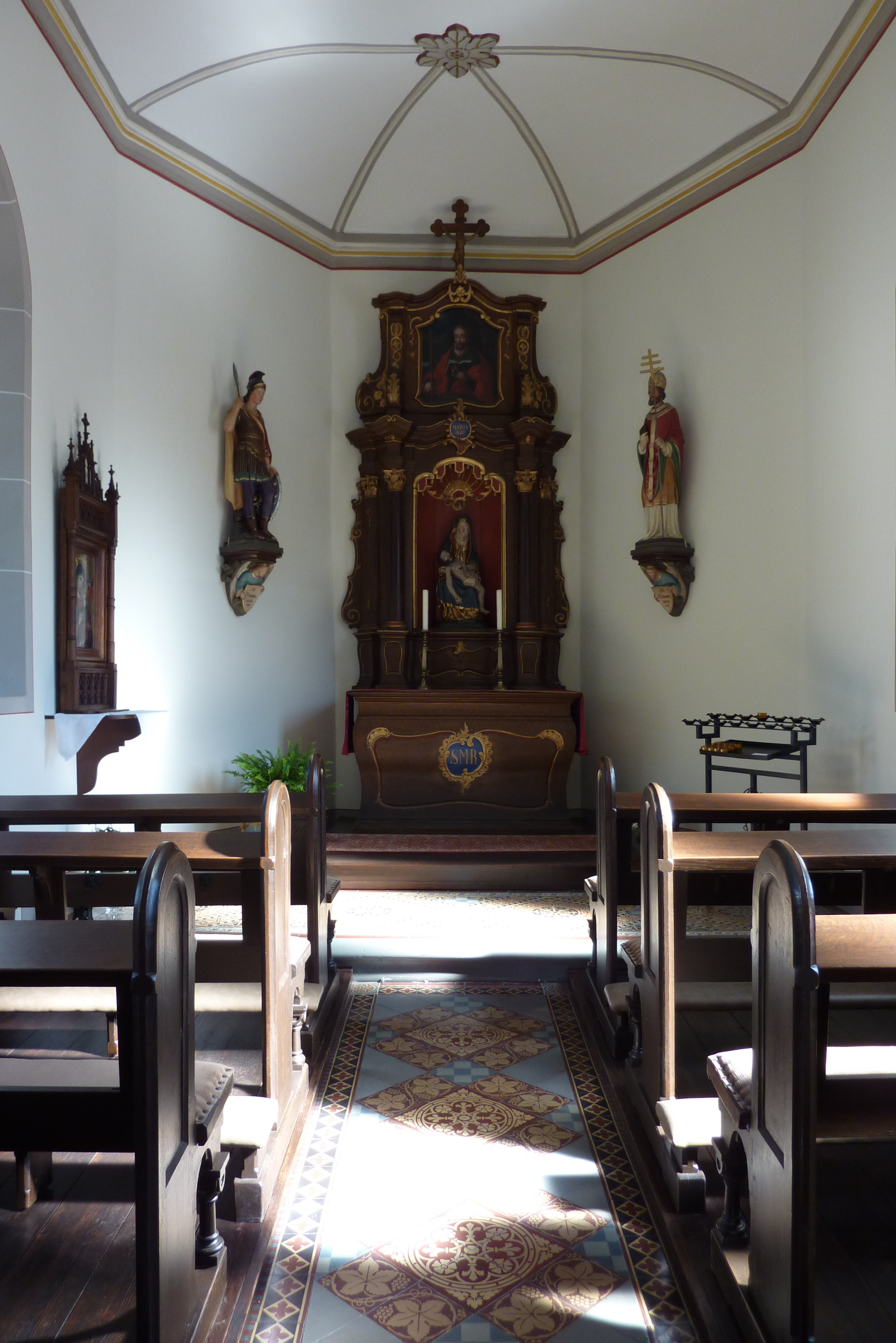 Kapelle Zur Schmerzhaften Muttergottes in Reimerzhoven, einem Ortsteil von Altenahr, Innenraum mit Blick auf die Altarnische